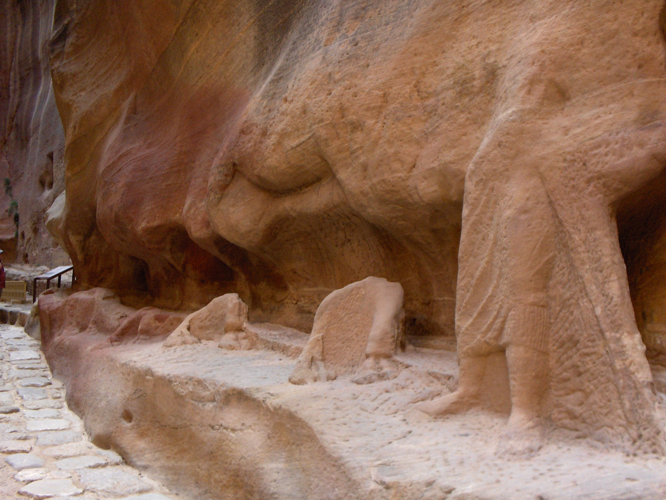 il Siq a Petra